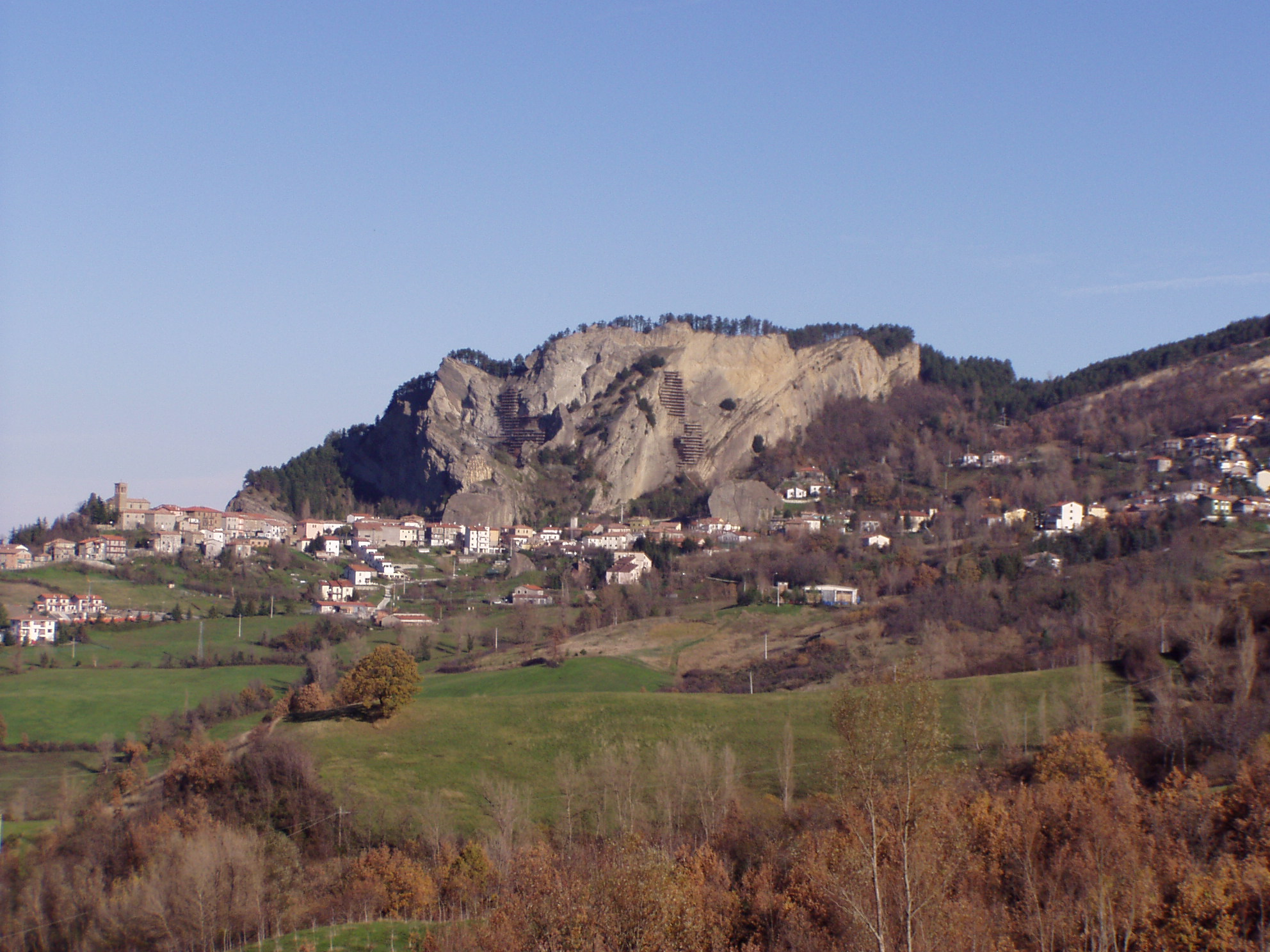 Questa foto l'ho scattata io con la mia fotocamera digitale esattamente 5 anni fa quindi ho licenza per utilizzarla e divulgarla su wikipedia.